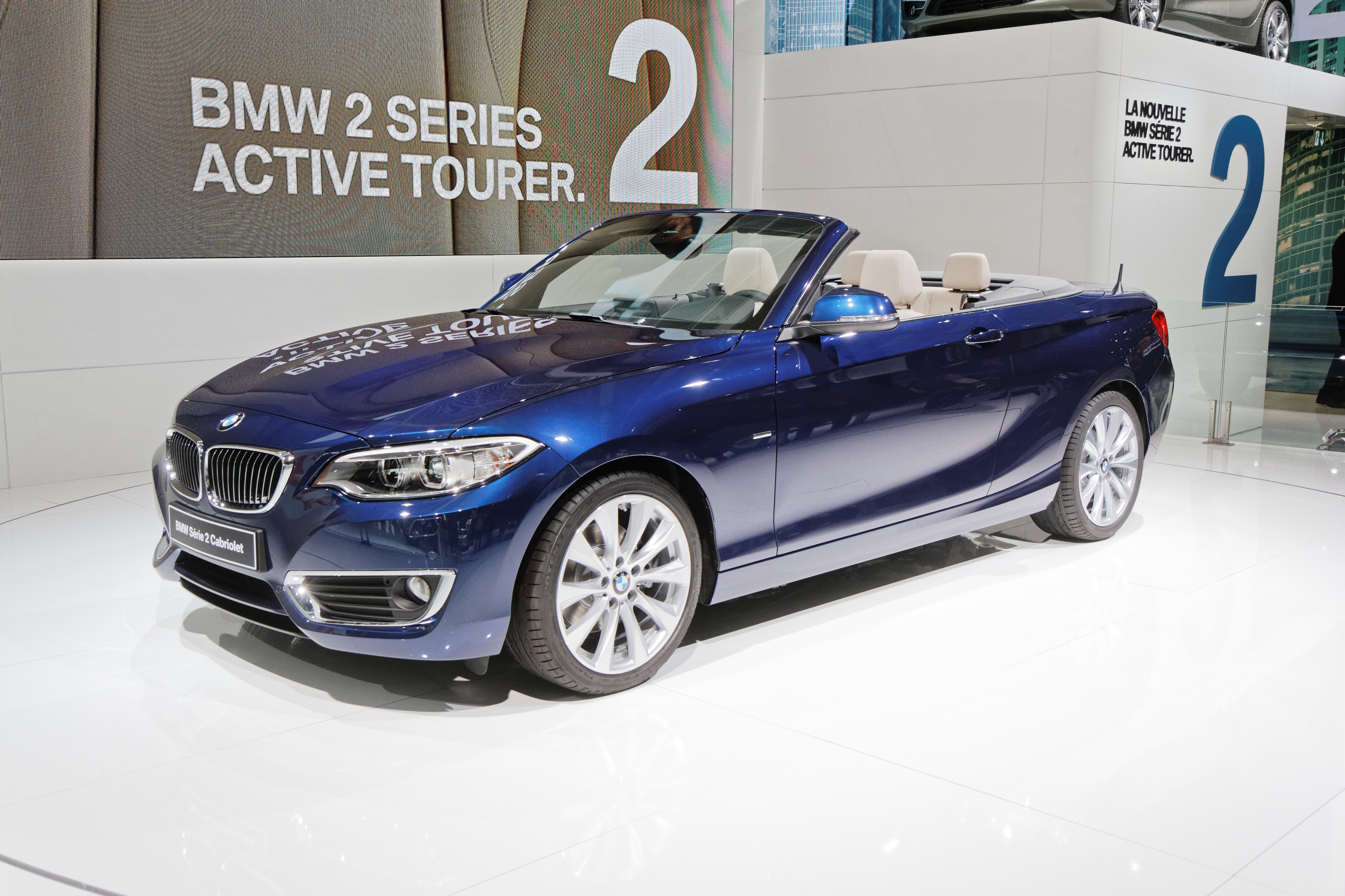 Une BMW Serie 2 Cabriolet présentée lors du mondial de l'automobile de Paris 2014.